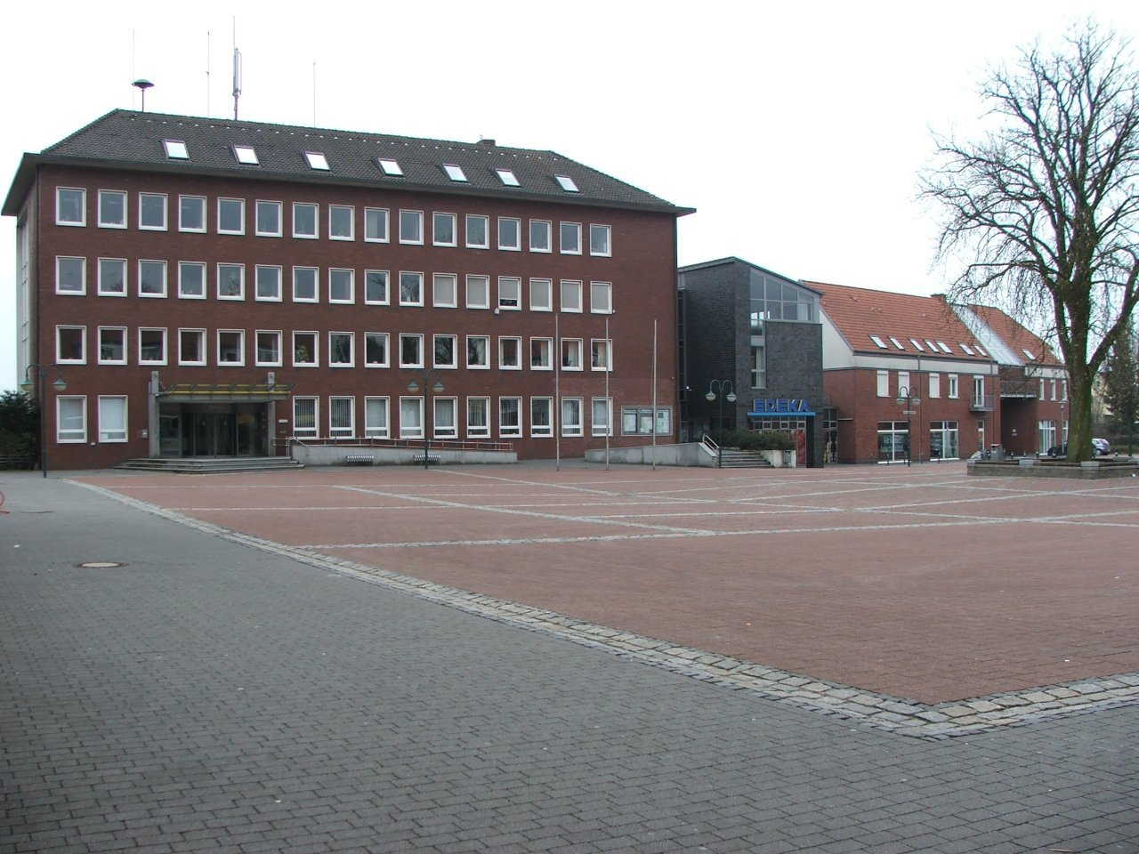 Marktplatz und Rathaus von Ennigerloh/Deutschland